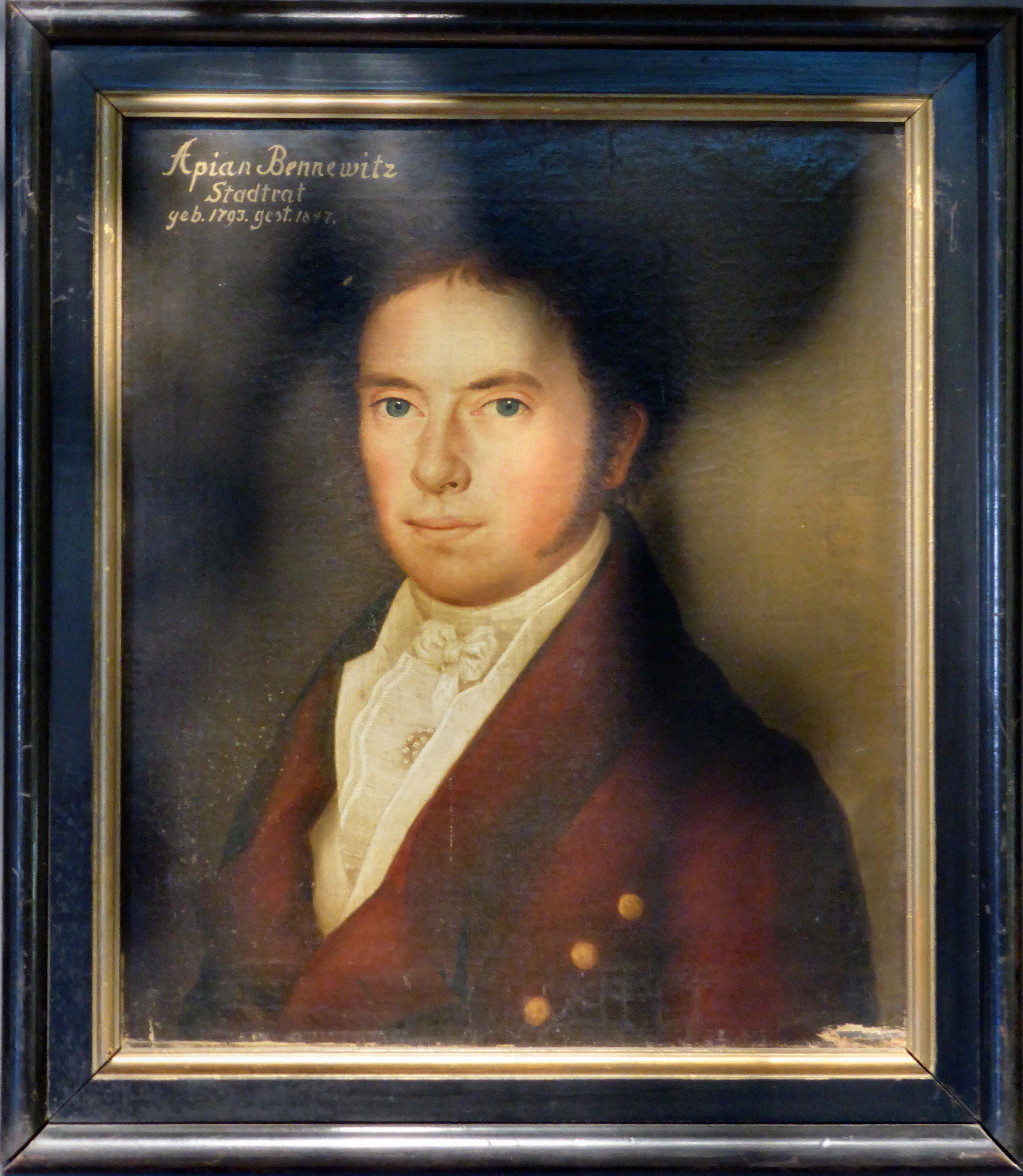 Ölgemälde von Apian-Bennewitz Stadtrat (Vermutlich von Marienberg) geb. 1793; gest. 1847. Ausgestellt im Museum sächsisch-böhmisches Erzgebirge in Marienberg.